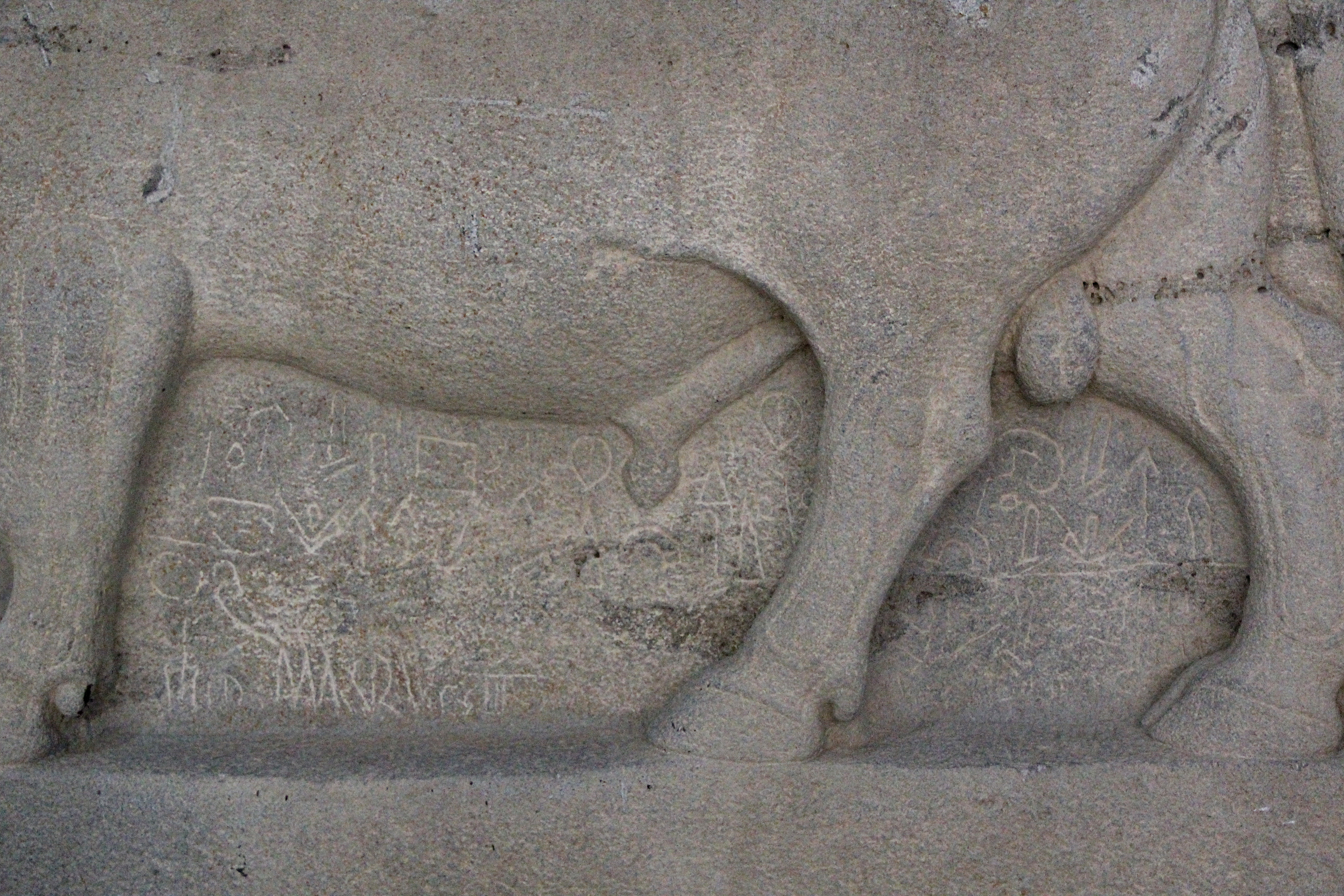 Archäologisches Museum Adana, Statue eines Wettergottes mit der "Bilingue von Çineköy", Hieroglypheninschrift zwischen den Beinen links